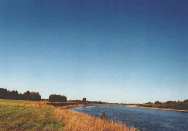 Fluss etwa 200 km NO von Tomsk, Russland